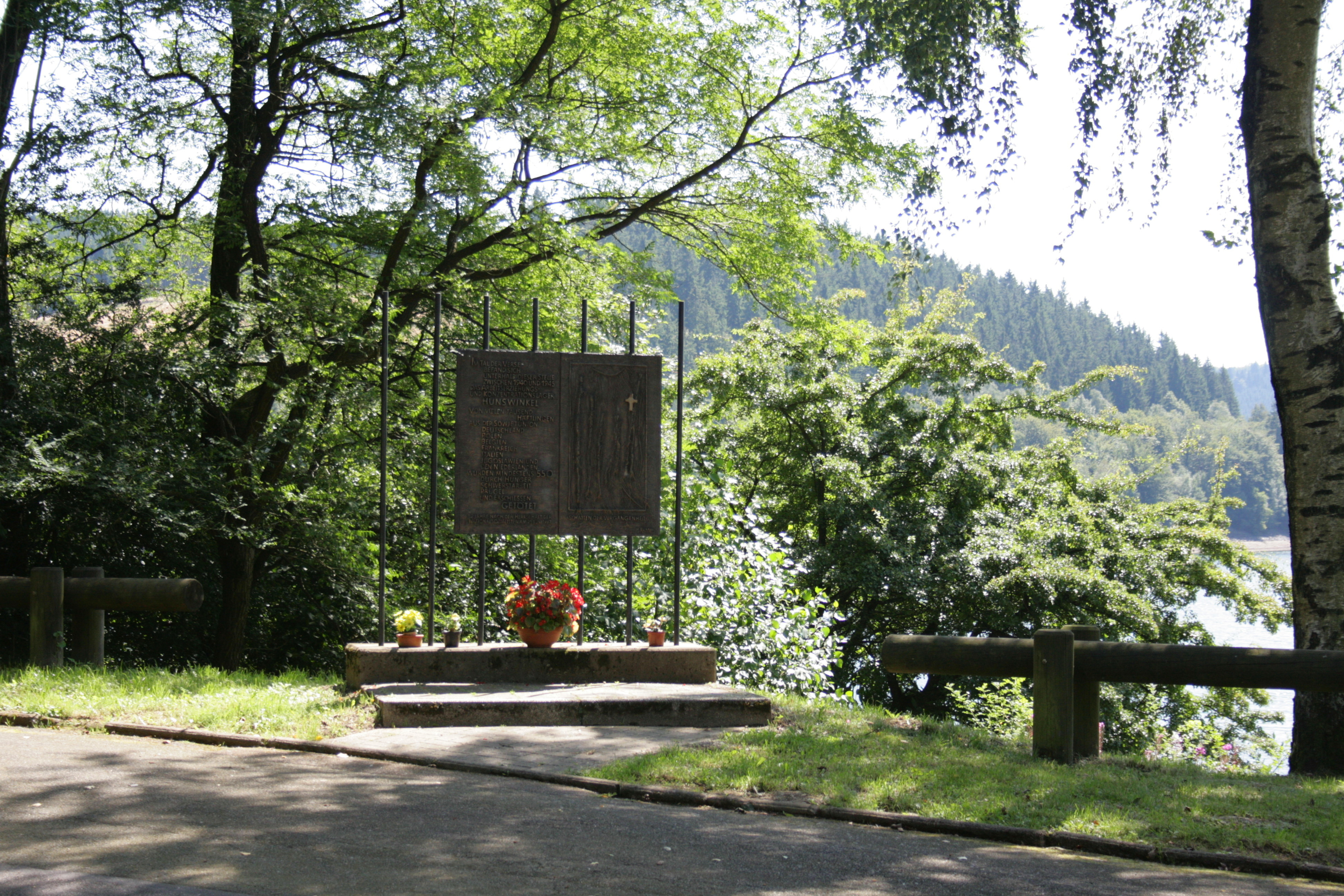 Mahnmal Hunswinkel an der Versetalsperre in Lüdenscheid